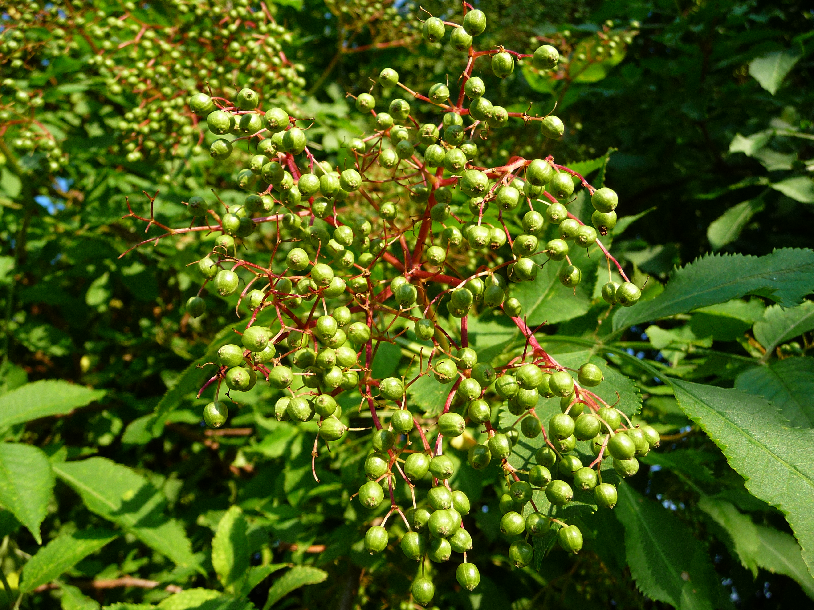 Unreife Früchte des Schwarzen Holunder (Sambucus nigra)